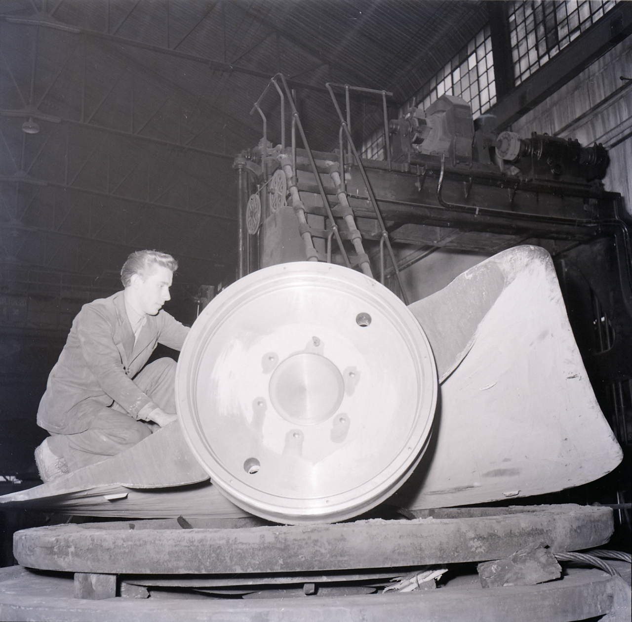 Servizio fotografico : Legnano, 1958 / Paolo Monti. - Buste: 40, Fototipi: 40 : Negativo b/n, gelatina bromuro d'argento/ pellicola ; 6x6. - ((Serie costituita da 40 buste di carta, tenute insieme da una graffetta, identificate con i una doppia numerazione: R21797/ R600, R21798/ R599, R21799/ R598, R21800/ R597, R21801/ R596, R21802/ R595, R2183/ R594, R21804/ duplic 593, R21804/duplic 593, R21805/ R593, R21806/ R592, R21808/ R590, R21809/ R589, R21810/ R588, R21811/ R587, R21812/ R586, R21813/ R585, R21815/ R583, R21816/ R582, R21817/ R581, R21818/ R580, R21819/ R579, R21821/ R577, R21822/R576, R21823/ R567, R21824/ R566, R21825, R21826/R565, R21827/ R564, R21828/ R563, R21829/ R562, R21830/ R 561, R21831/R560, R21832/R559, R21833/ R558, R21834/ R557, R21835/ R556, R21836/ R555, R21837/R554, R21838/R553, R21839/R552. - Fonte: Agenda di Paolo Monti: Foto Leica 1 / 1-51 verde, 1-110 nera (1958-1963), presso Archivio Paolo Monti